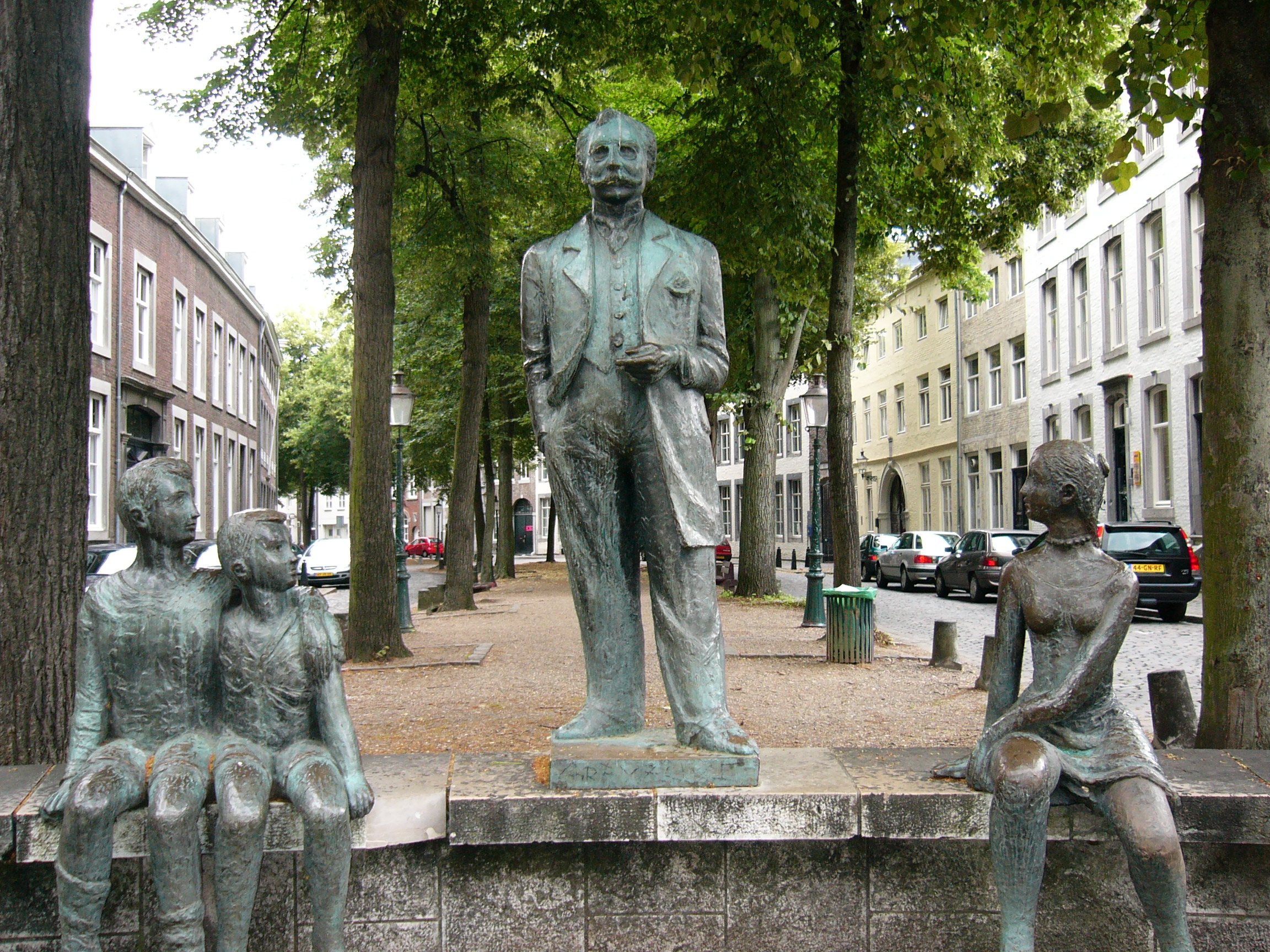 Standbeeld van Fons Olterdissen, gemaakt door Willem Hofhuizen, aan de Grote Looiersstraat in Maastricht